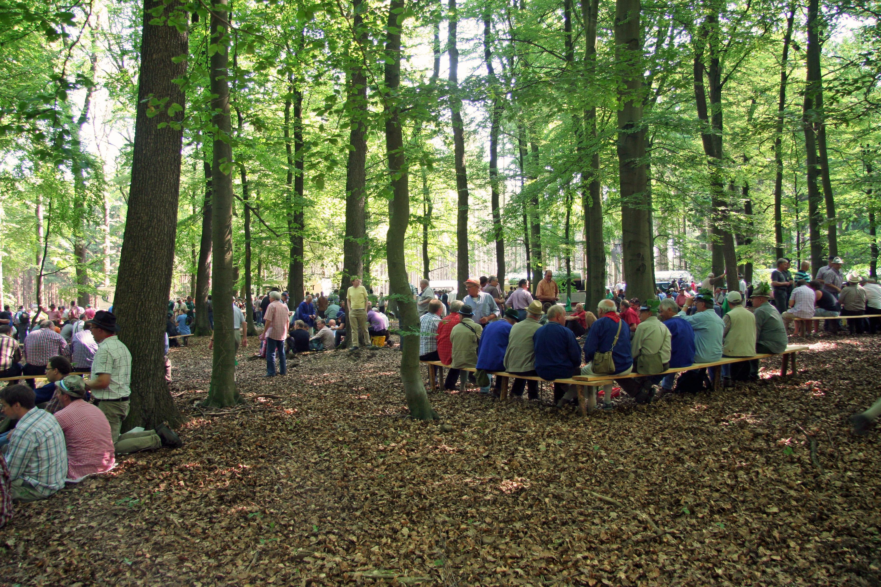 Auf dem Frühstücksplatz der Schnade 2010